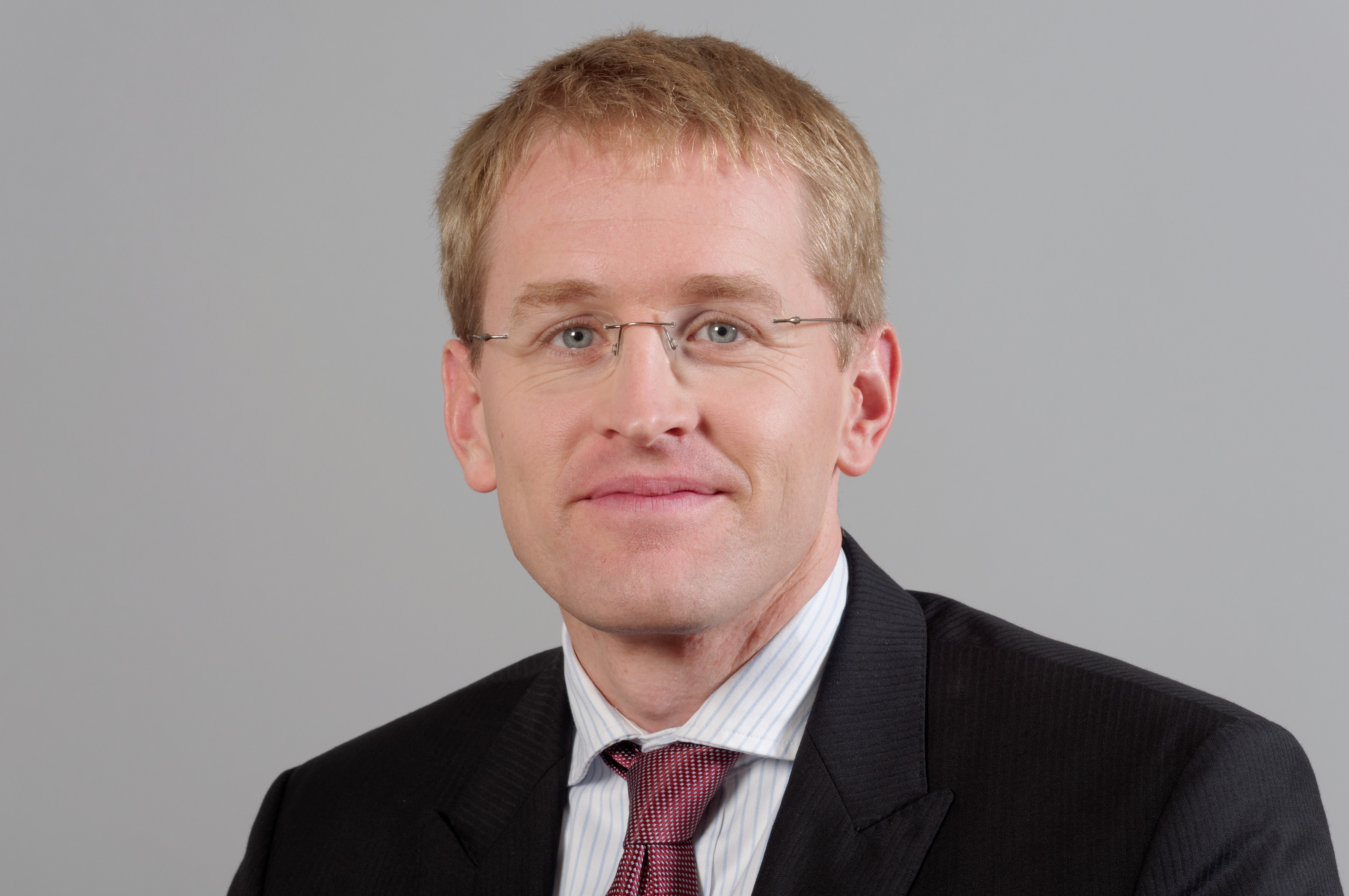 Daniel Günther, CDU